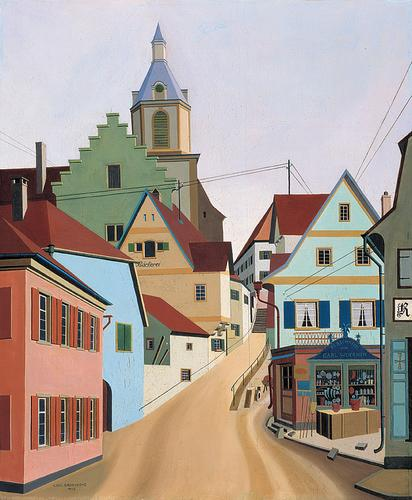 Creglingen (Blick zur Ev. Stadtkirche)